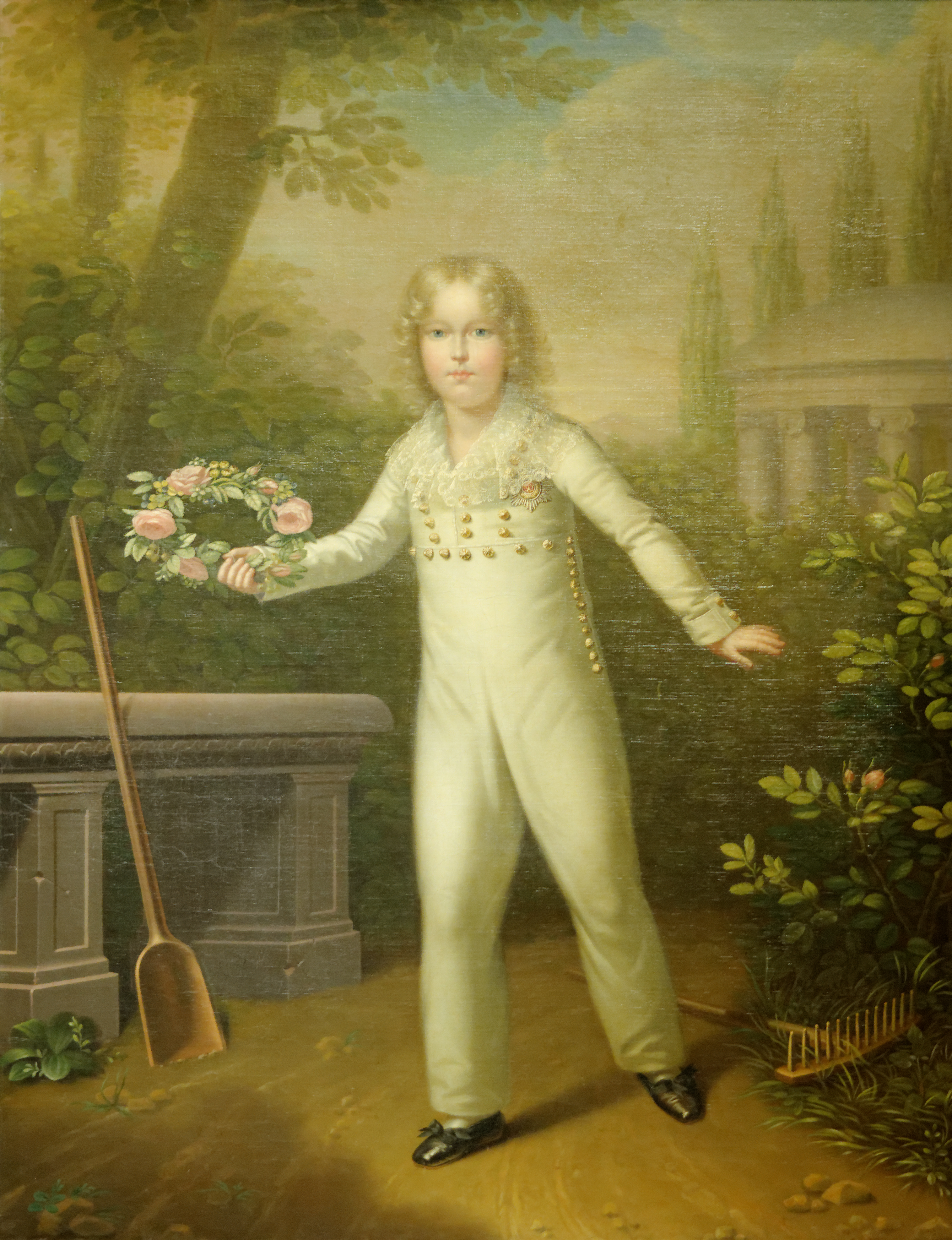 Der Herzog von Reichstadt als kleiner Gärtner